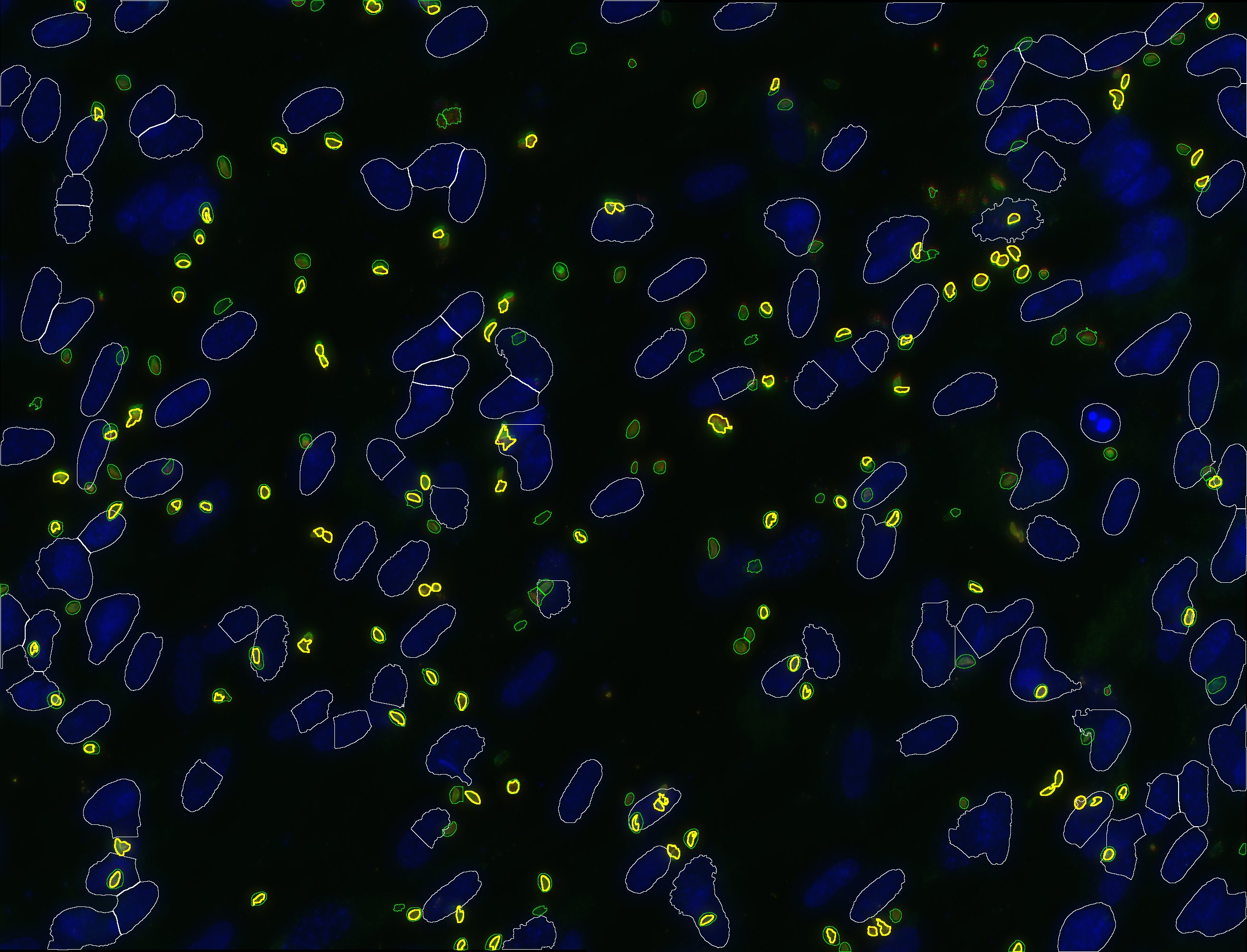 Une technique In vitro (la culture de fibroblaste et leur infection par le parasite T.gondii) et une technique In silico (analyse de l'image de microscopie par fluorescence par un logiciel de traitement) ont été nécessaire pour mettre en évidence les parasites ayant infectés les fibroblastes en vert des parasites extracellulaires en jaune.